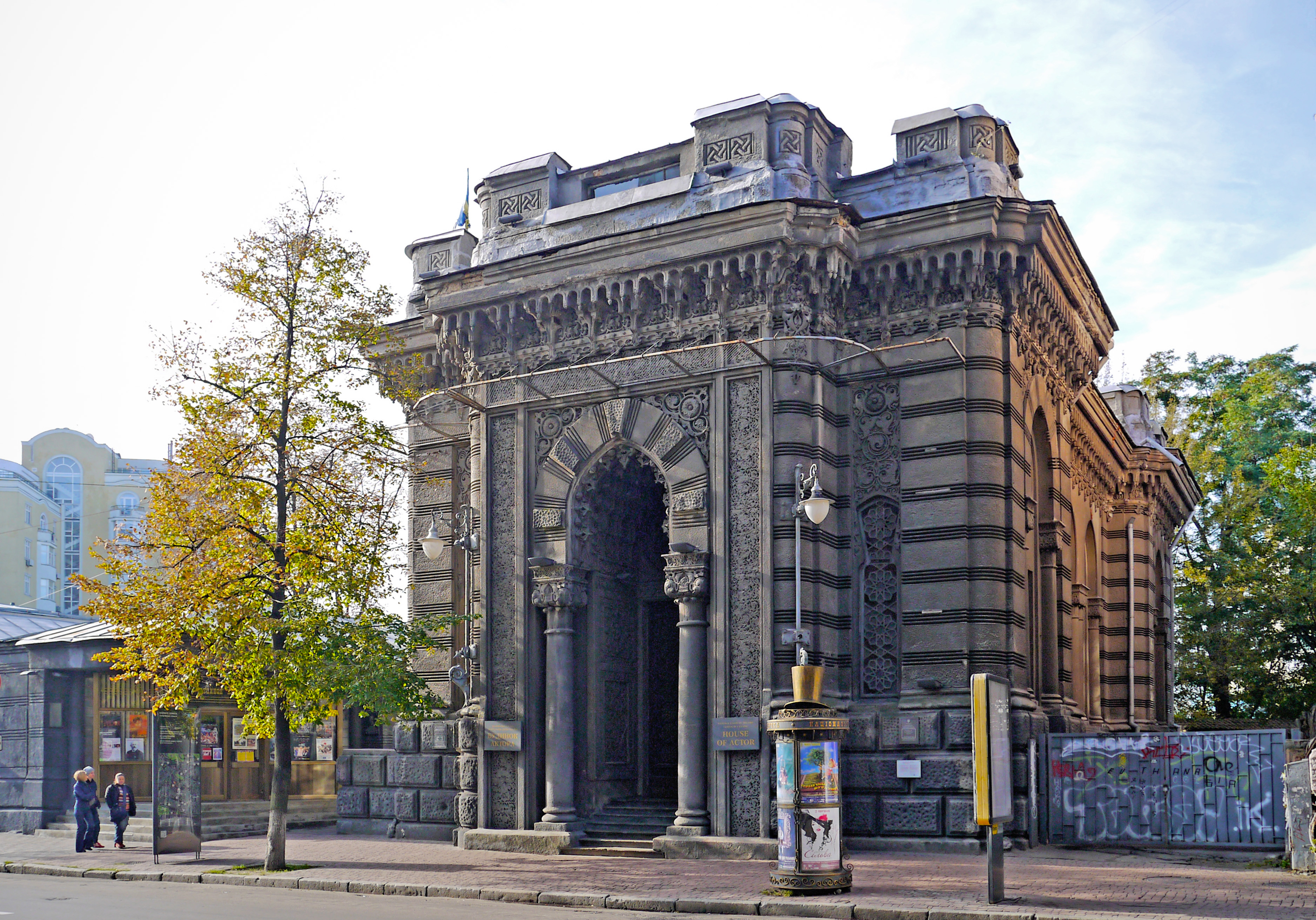 Кенаса караїмська, Київ, вул. Ярославів Вал, 7